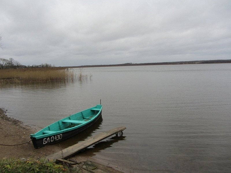 Свір. Возера Свір